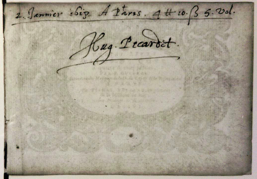 Manuscript exlibris of Hugues Picardet (died 1641) on a music print